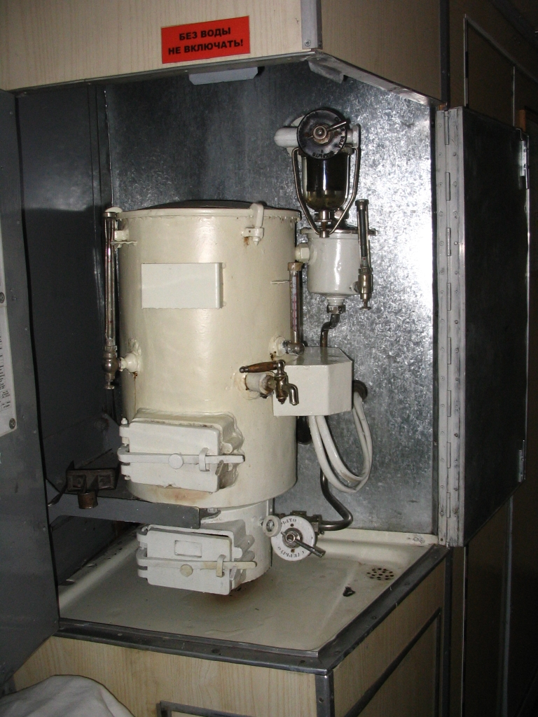 "Titan" water heater in train in Russia. Титан в плацкартном вагоне поезда Адлер-Томск